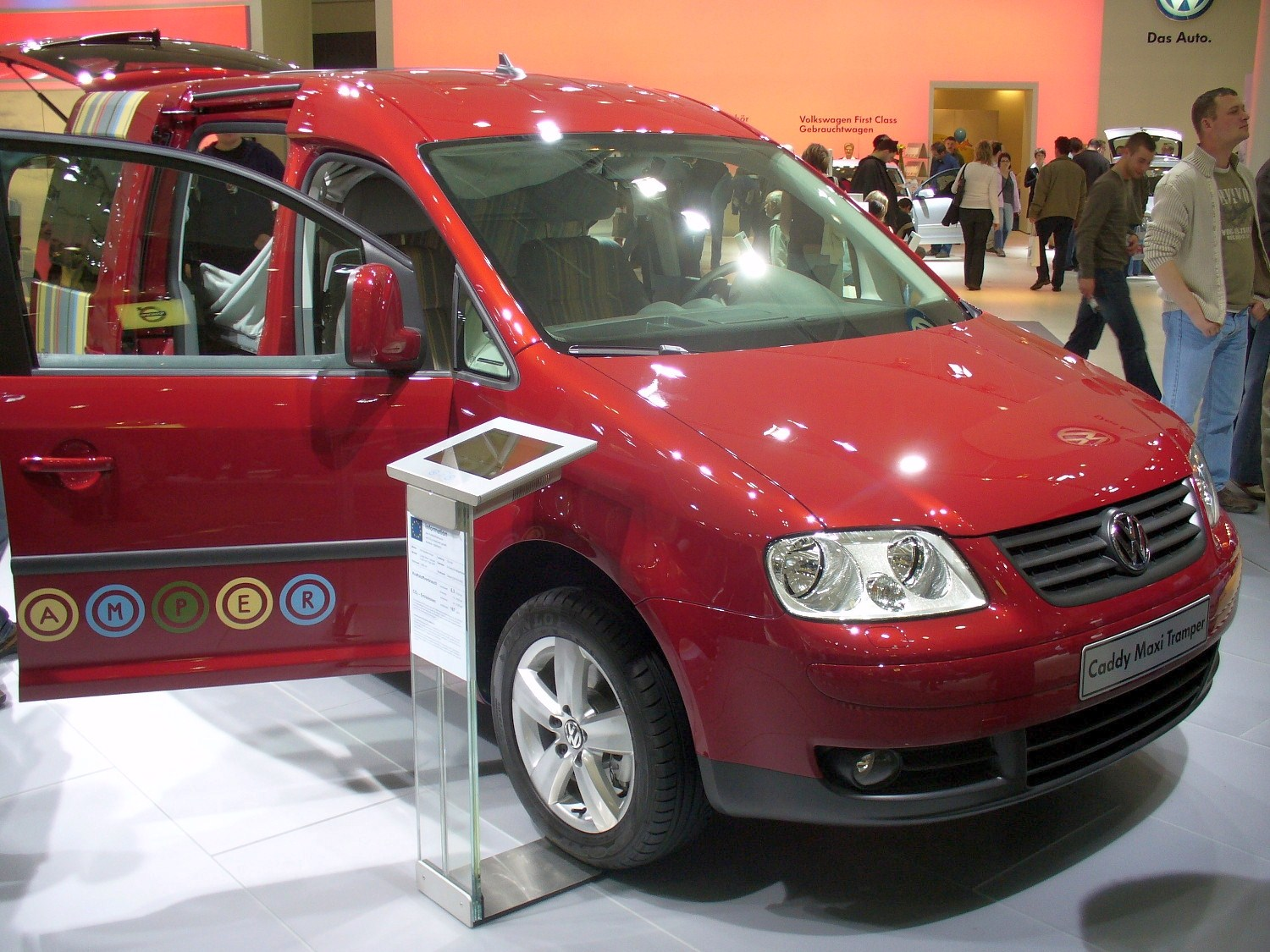 VW Caddy Maxi Tramper